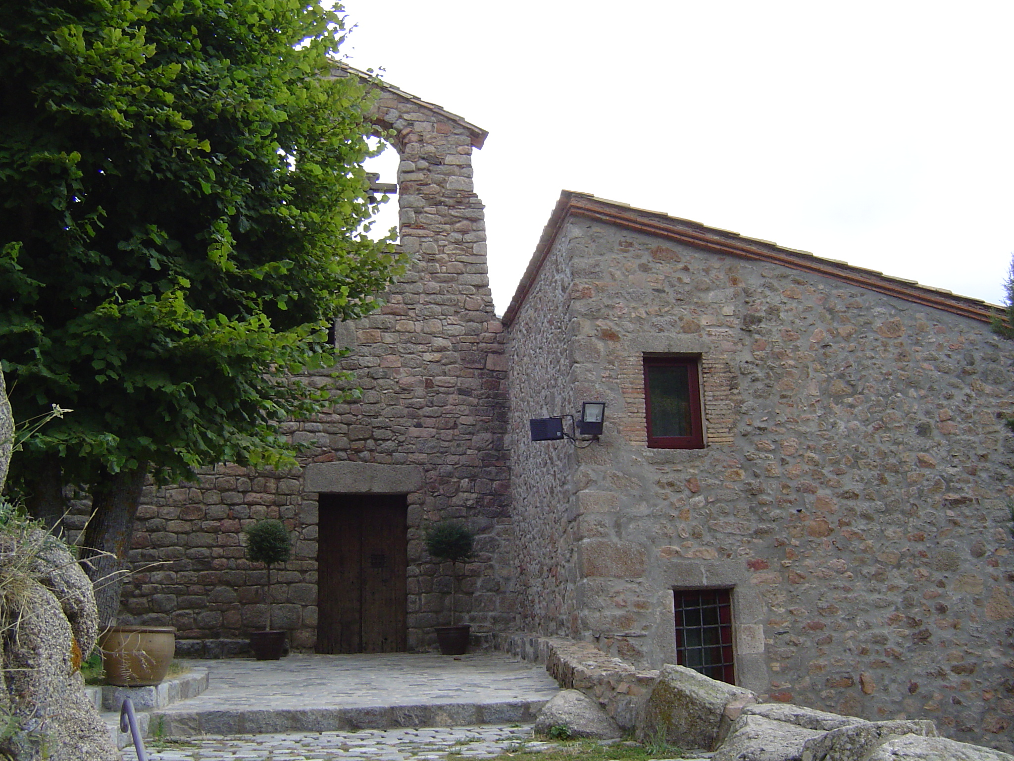 Sant Marçal de Montseny, actualment hostatgeria d'excursionistes